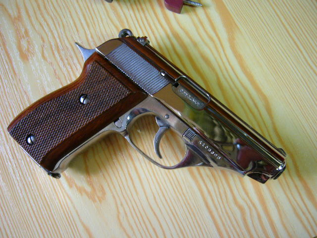 Pistolet Astra Constable